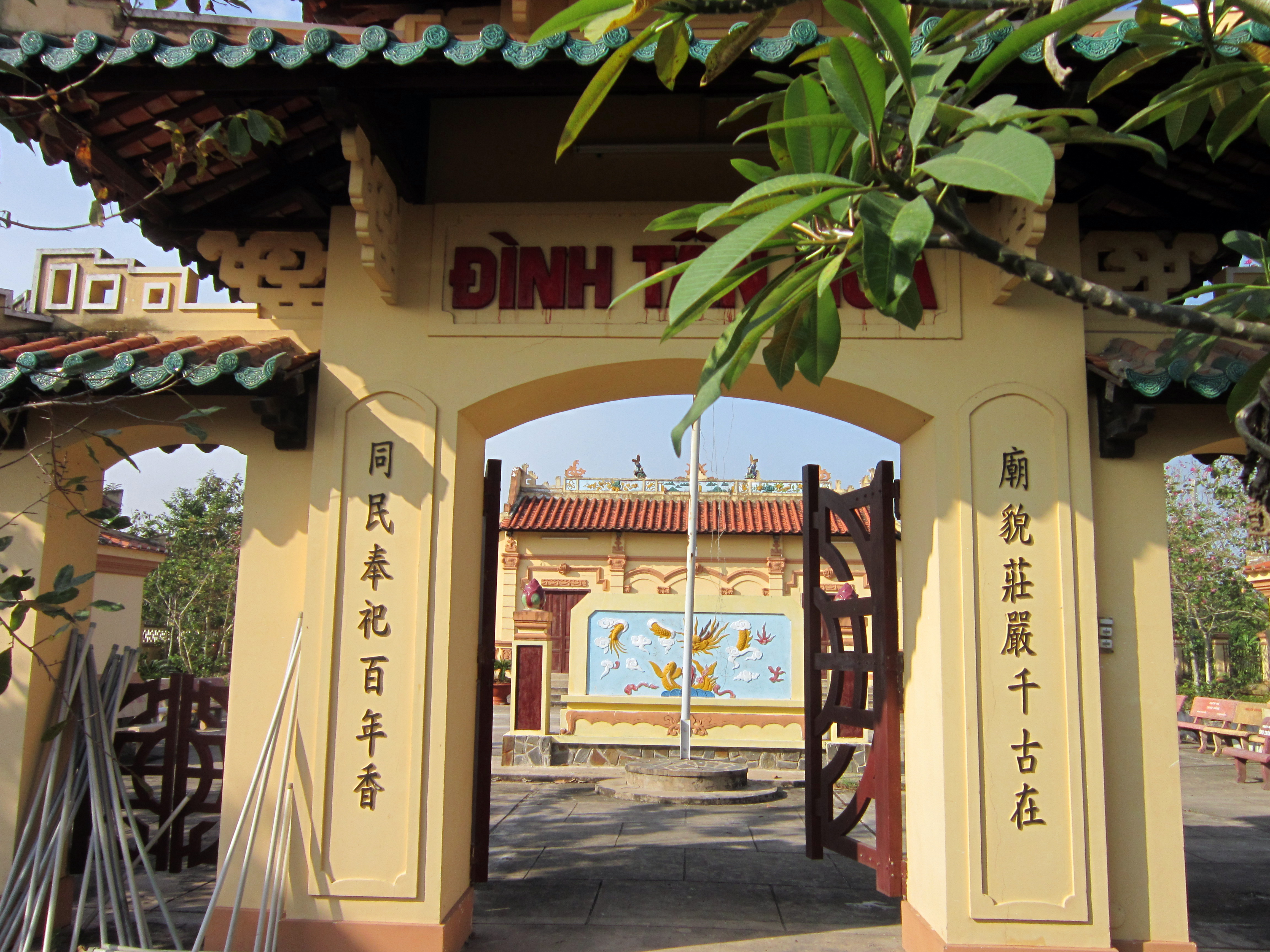 Cổng chính đình Tân Hoa. Ngôi đình ở ấp Tân Hưng, xã Tân Hòa, thành phố Vĩnh Long, tỉnh Vĩnh long. Đây là di tích "lịch sử-văn hóa" cấp quốc gia Việt Nam.